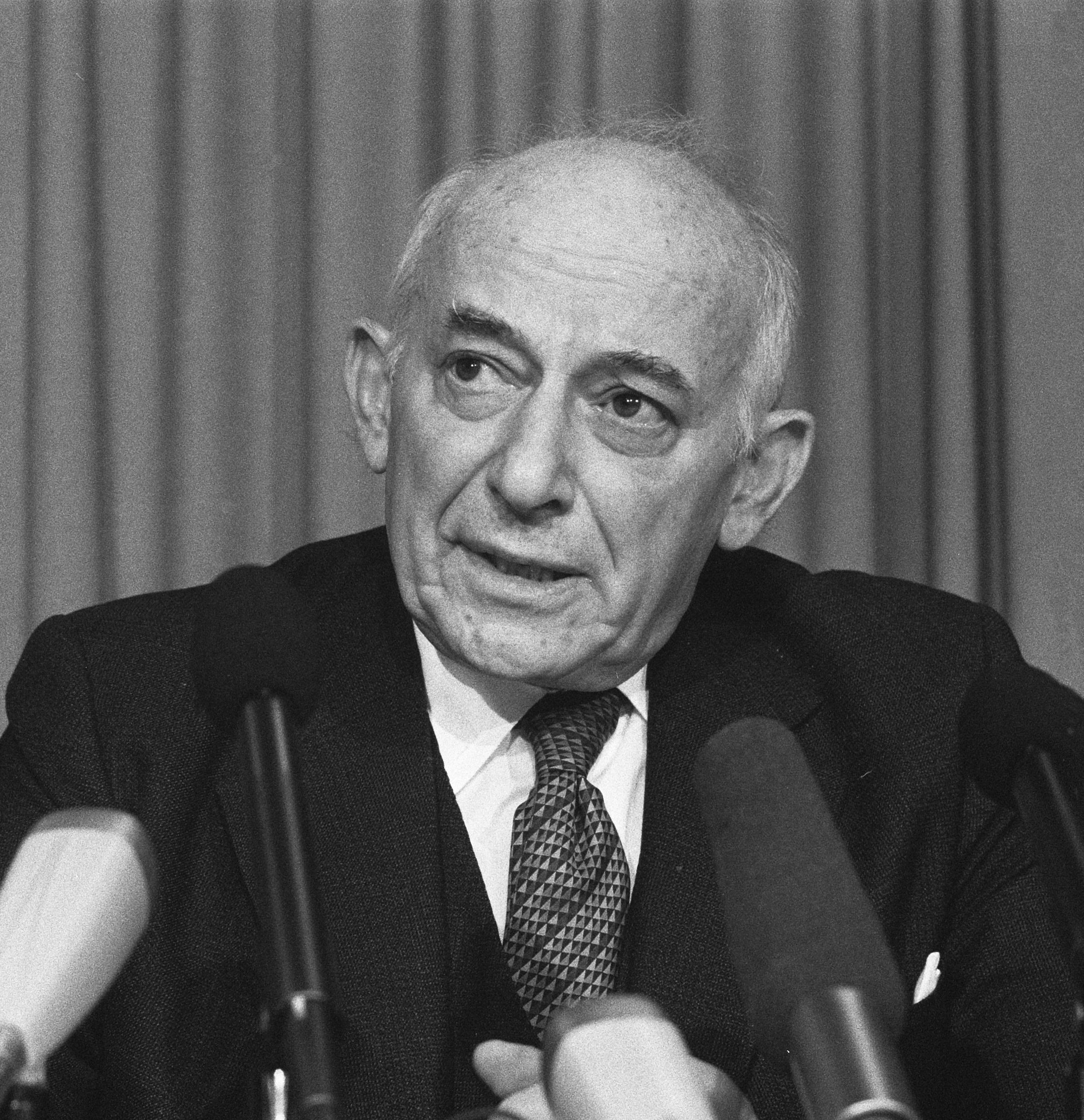 Persconferentie in Nieuwspoort door het Hoofd van het Amerikaans Bureau voor Wapenbeheersing en Ontwapening, Eugene Rostow